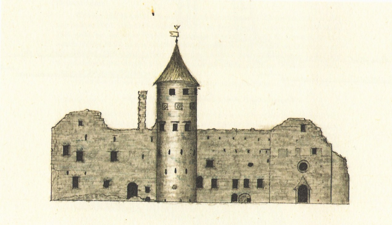 Haapsalu linnuse vaade läänest